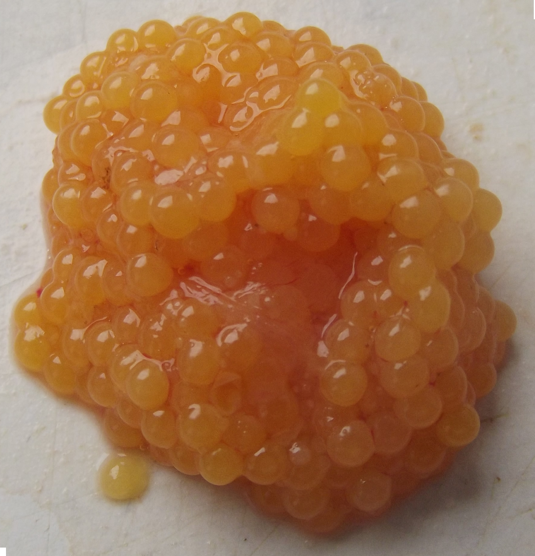 Ikra sumika karłowatego (Ameiurus nebulosus }